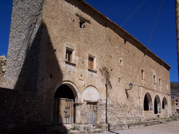 Edificios siglo XVI en el Maestrazgo de Aragón. En España. En primer término, el Hospital de los Pobres, y en segundo, el Ayuntamiento con su trinquete.